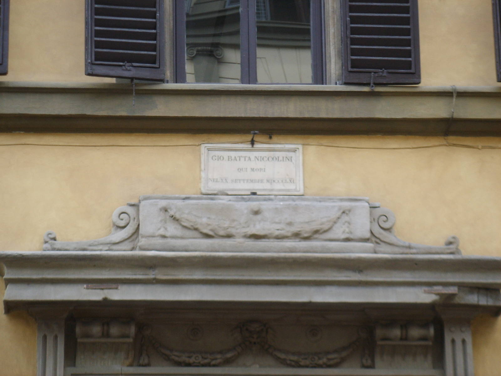 Via Cavour, Firenze; lapide sulla casa natale di Giovan Battista Niccolini.